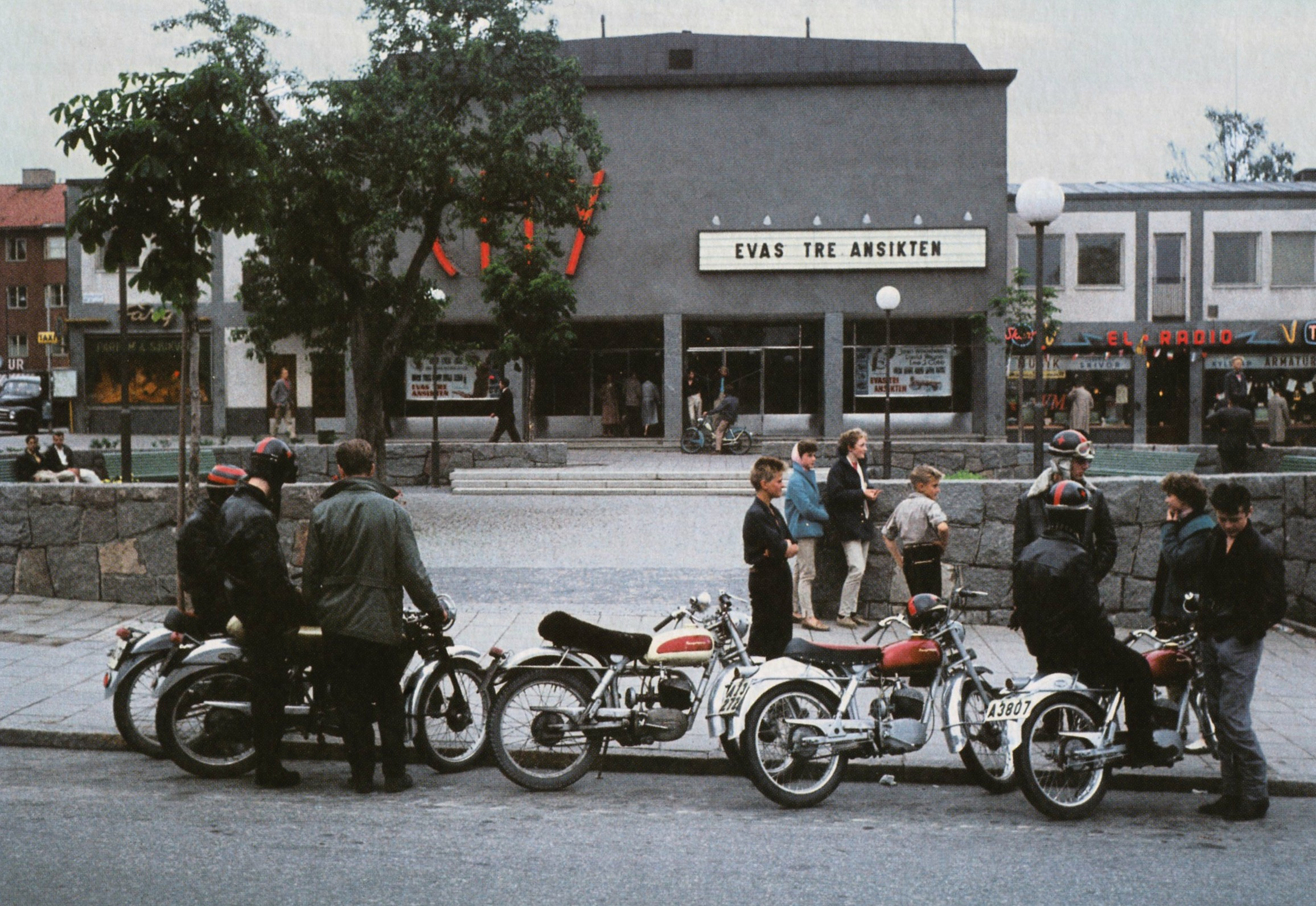 Gubbängstorget och biografen "CITY" 1958